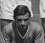 André Fefeu avec l'équipe de l'AS Saint-Etienne en 1968.